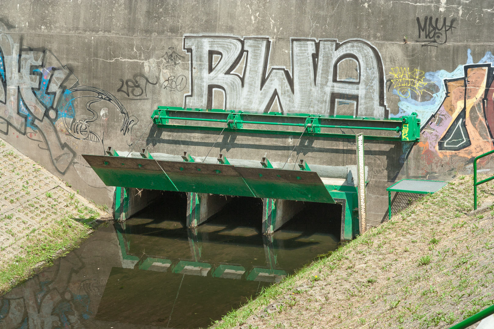 Kanał Nowa Ulga wypływający przy Moście Siekierkowskim spod Wału Miedzeszyńskiego z przepompowni Bluszcze. This is a photography of Natura 2000 protected area with ID PLB140004